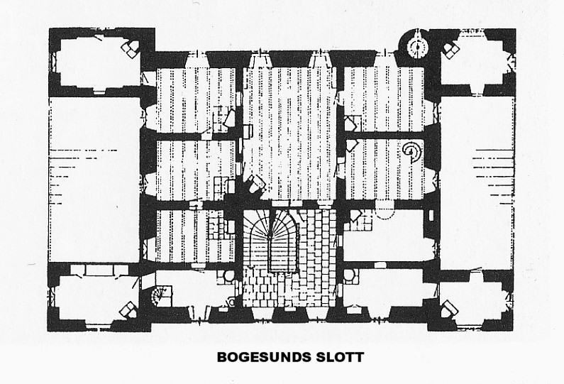 Bogesunds slott, planritning (vån. 2 och 3)